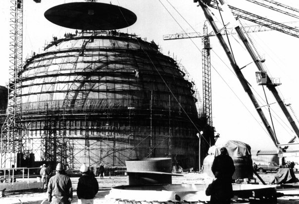 Construcción de la CNA I